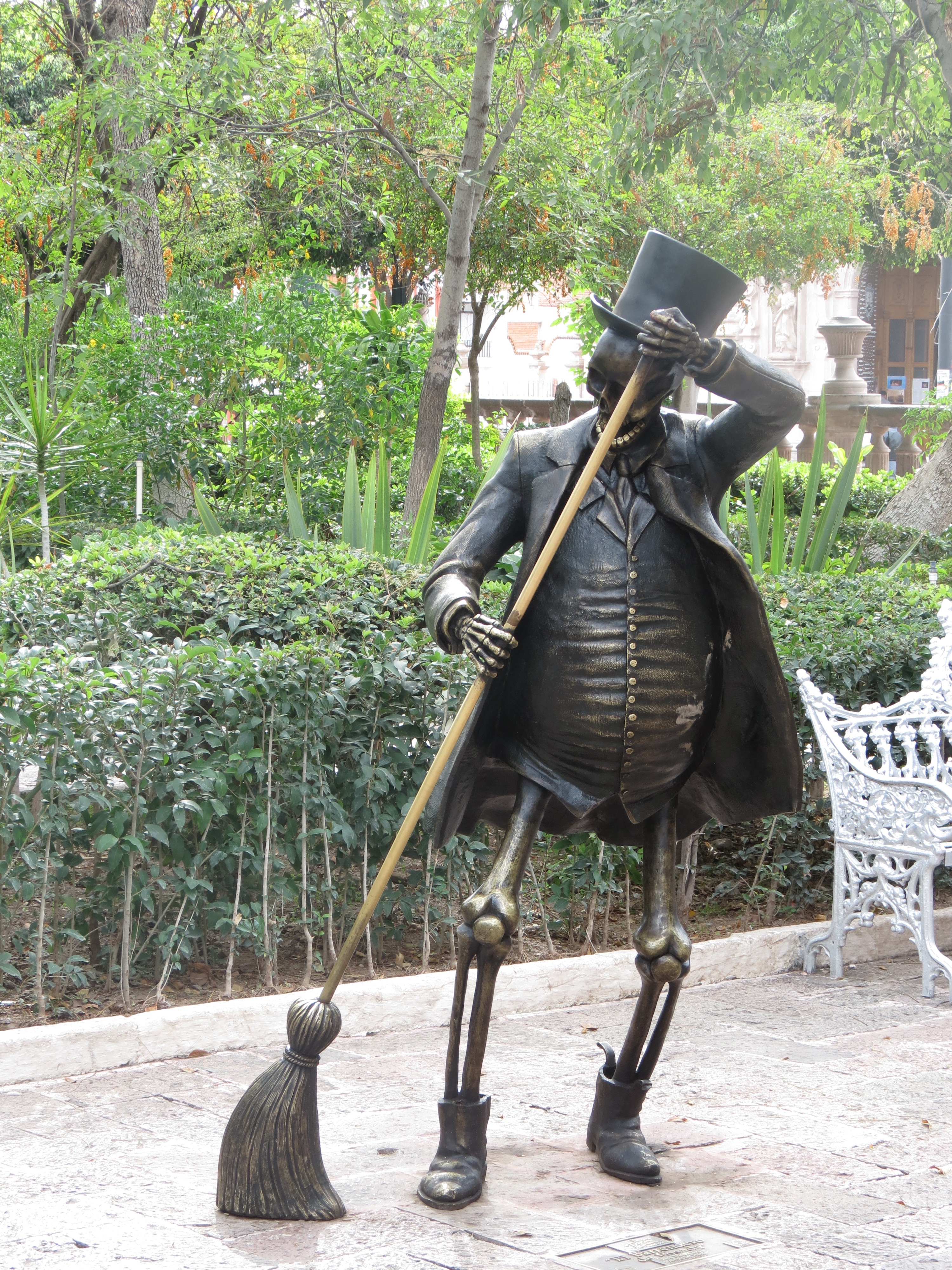 La muerte de Posada, escultura del Jardín de San Marcos, Aguascalientes, México